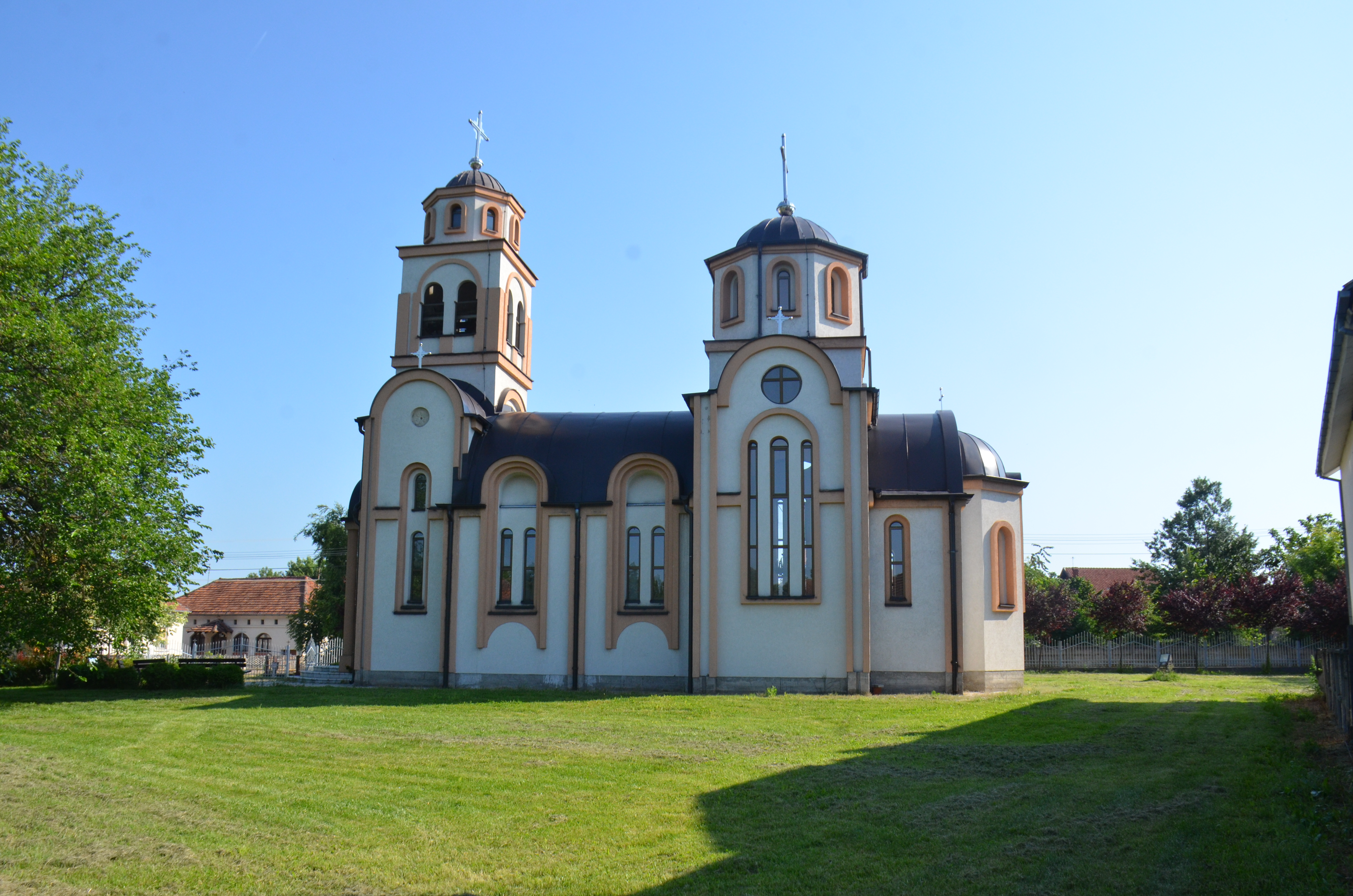 Српски (ћирилица): Запис - дуд код цркве, село Дубље, Општина Свилајнац, Поморавски округ, Србија